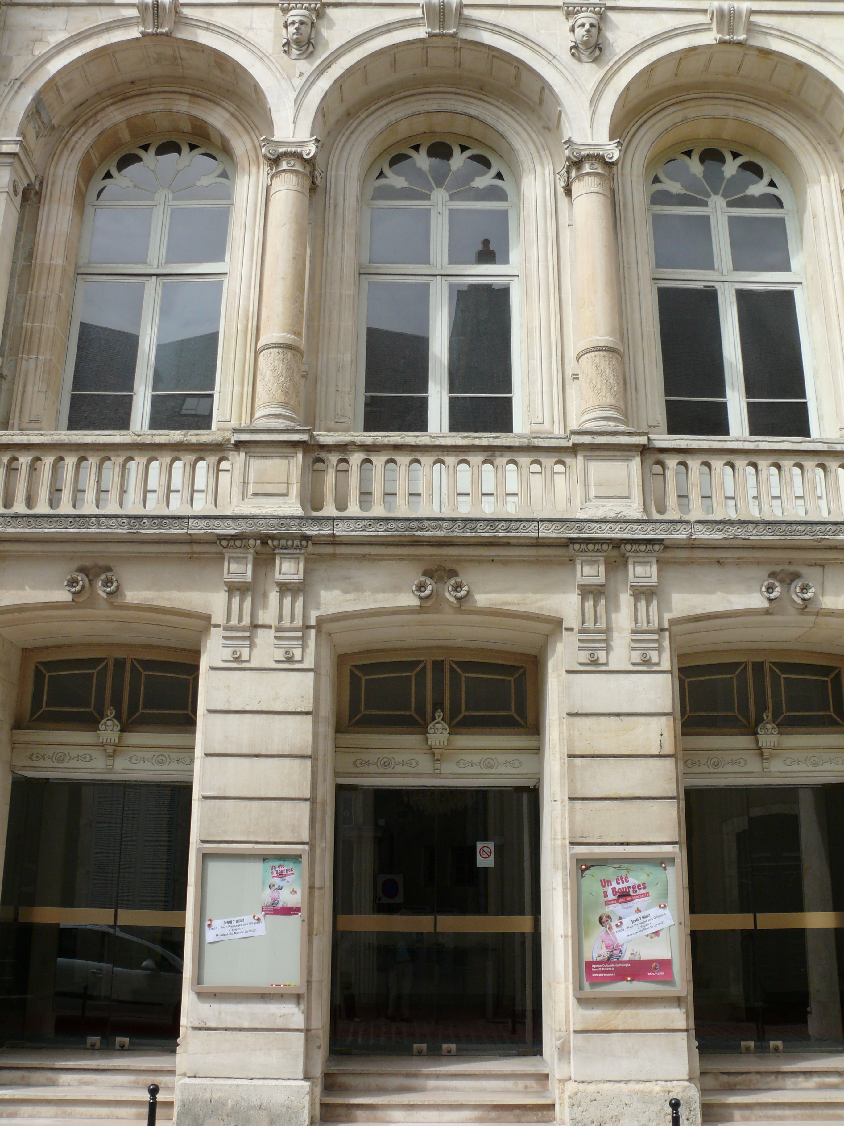 Bourges - Théâtre Jacques-Cœur